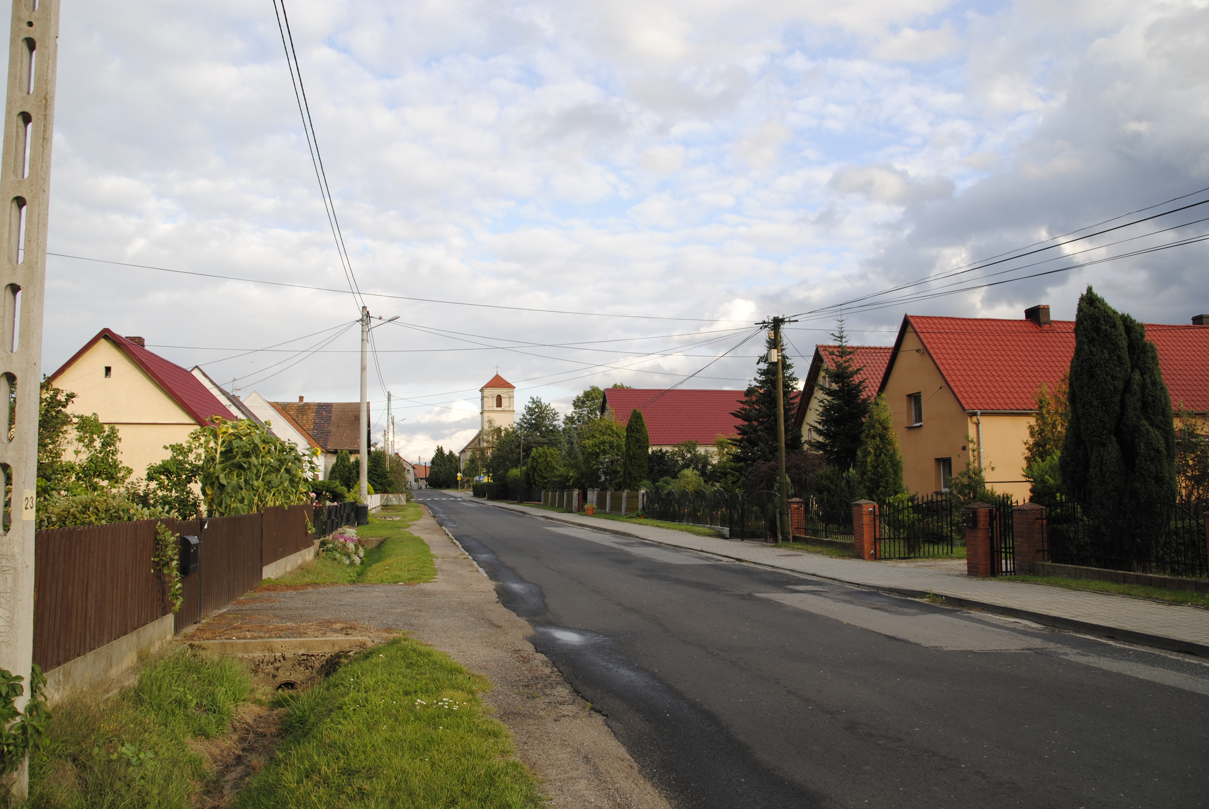 Straßenpartie im oberschlesischen Dorf Brande, Gemeinde Dambrau (Prądy )